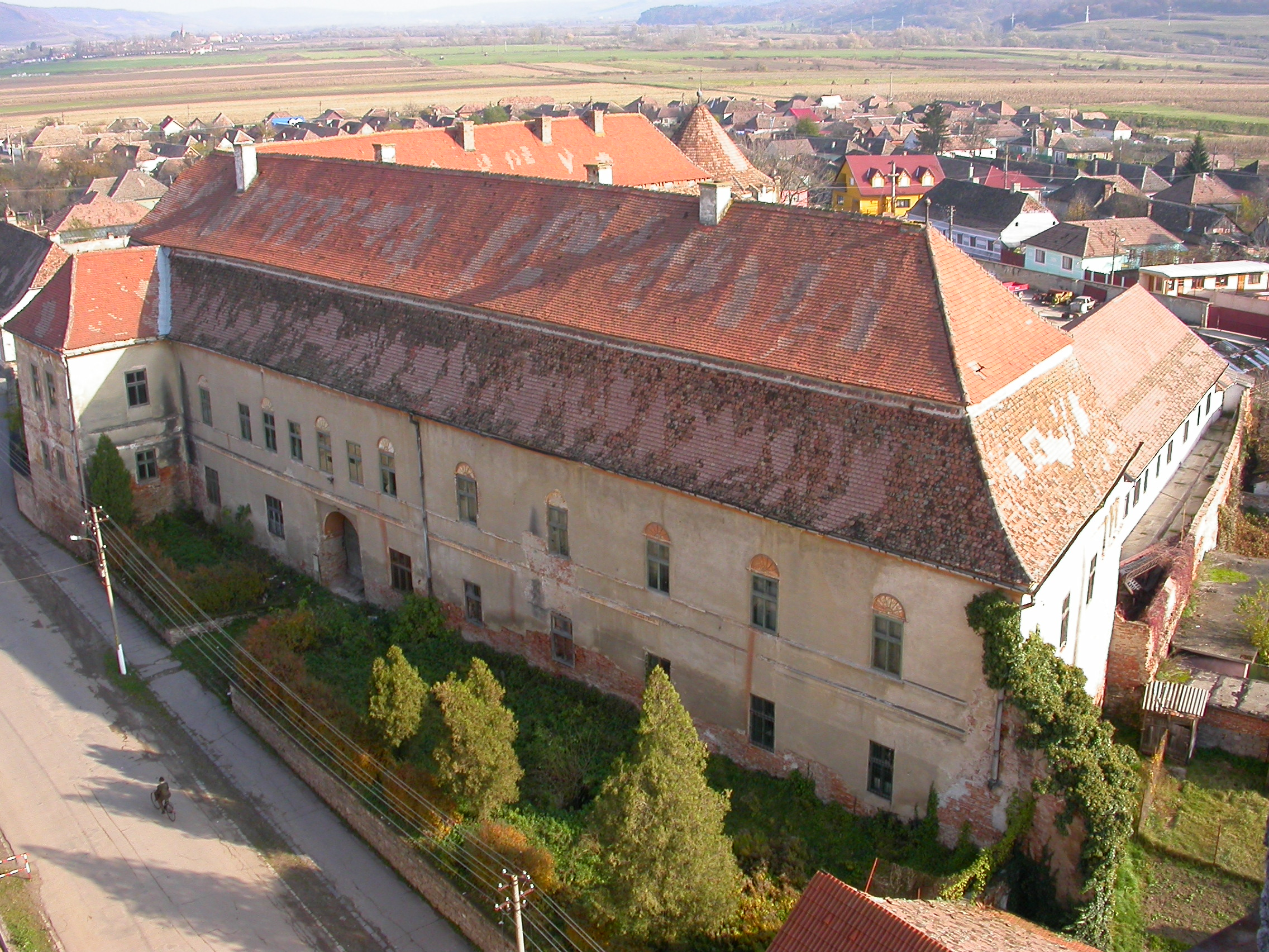 Castelul Apafi, 1552, 1650-1700